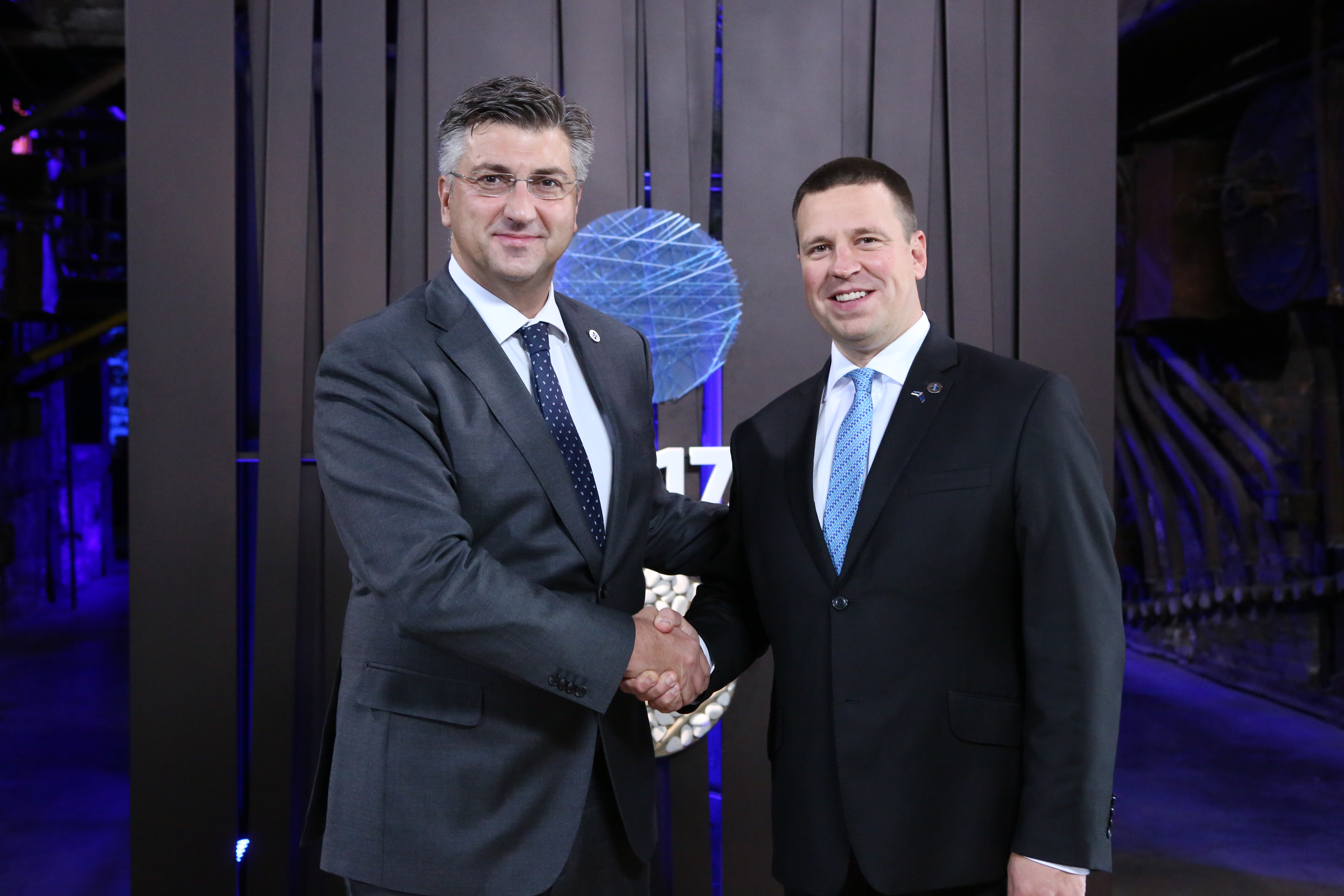 (l-r) Andrej Plenković, Prime Minister, Croatia; Jüri Ratas, Prime Minister, Estonia Photo: Annika Haas (EU2017EE)